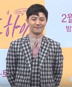 7일 오후, 서울시 강남구 논현동 임패리얼 팰리스 호텔에서 JTBC 새 금토드라마 '리갈하이'의 제작발표회가 열려 배우 진구, 서은수, 이순재, 채정안, 윤박, 정상훈이 참석했다.